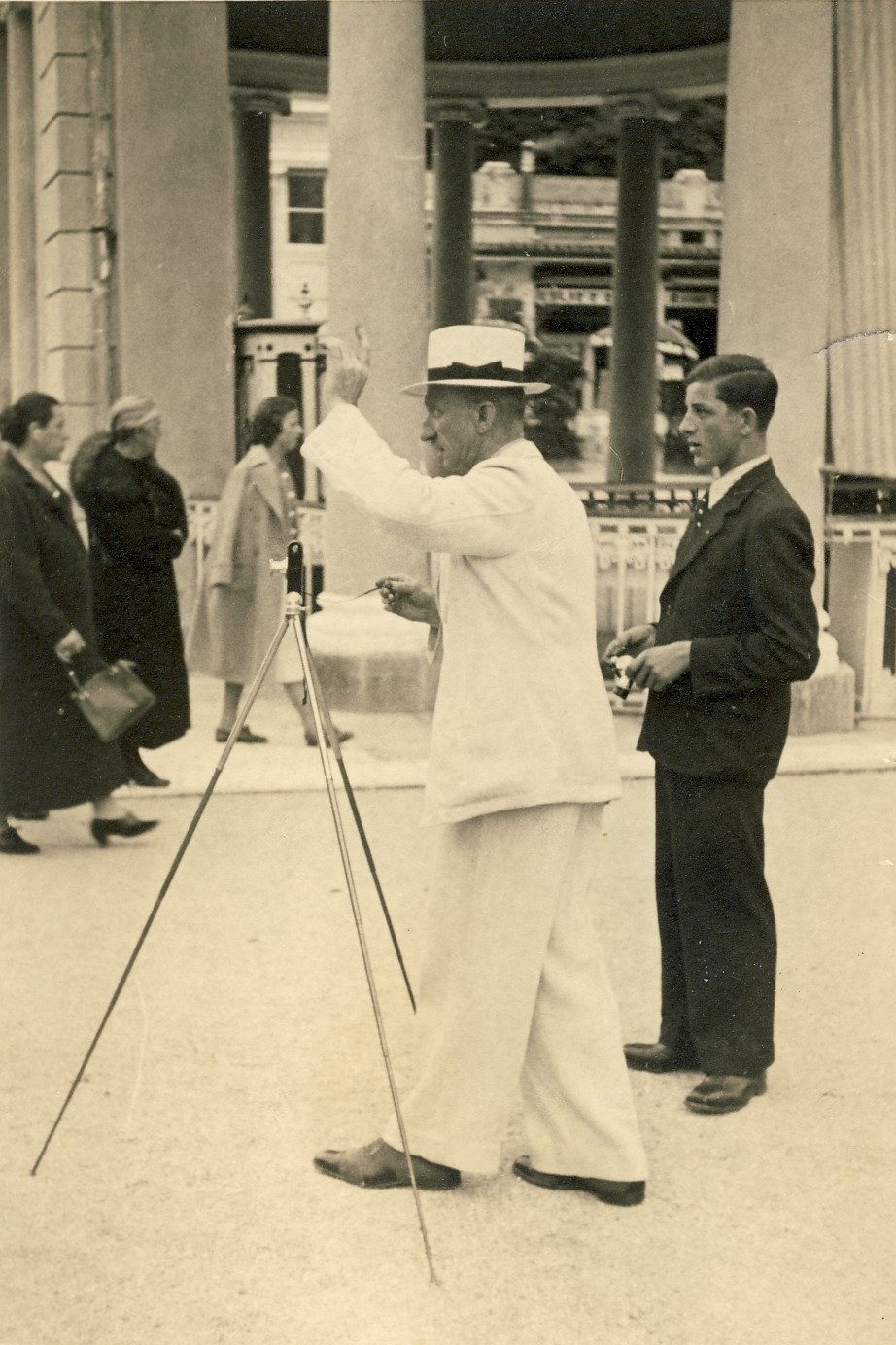 Fotografiranje v Celju.